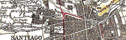 Santiago de Chile 1926, Ausschnitt.